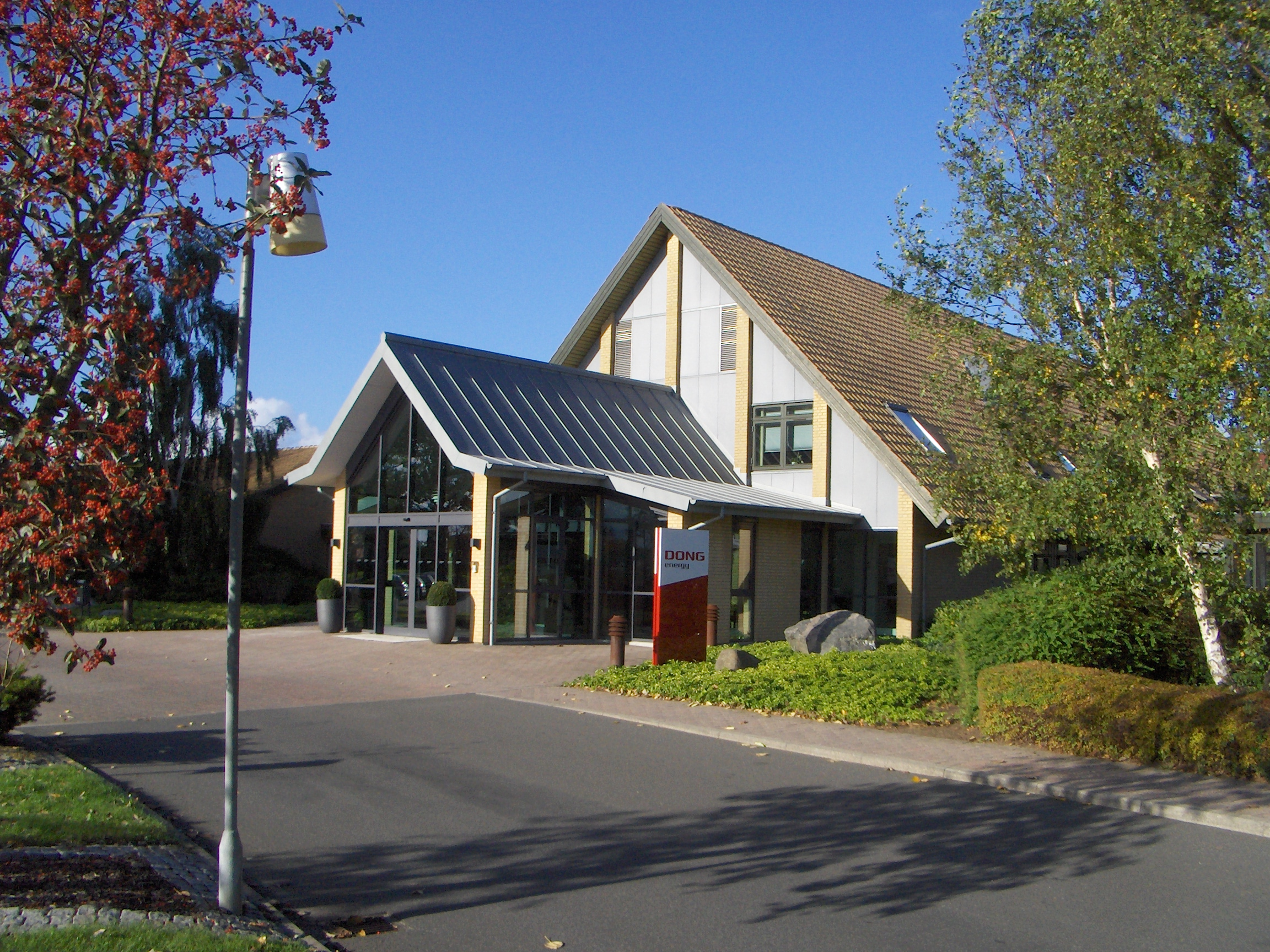 DONG Energy Headquarter, Skærbæk, Fredericia, Denmark